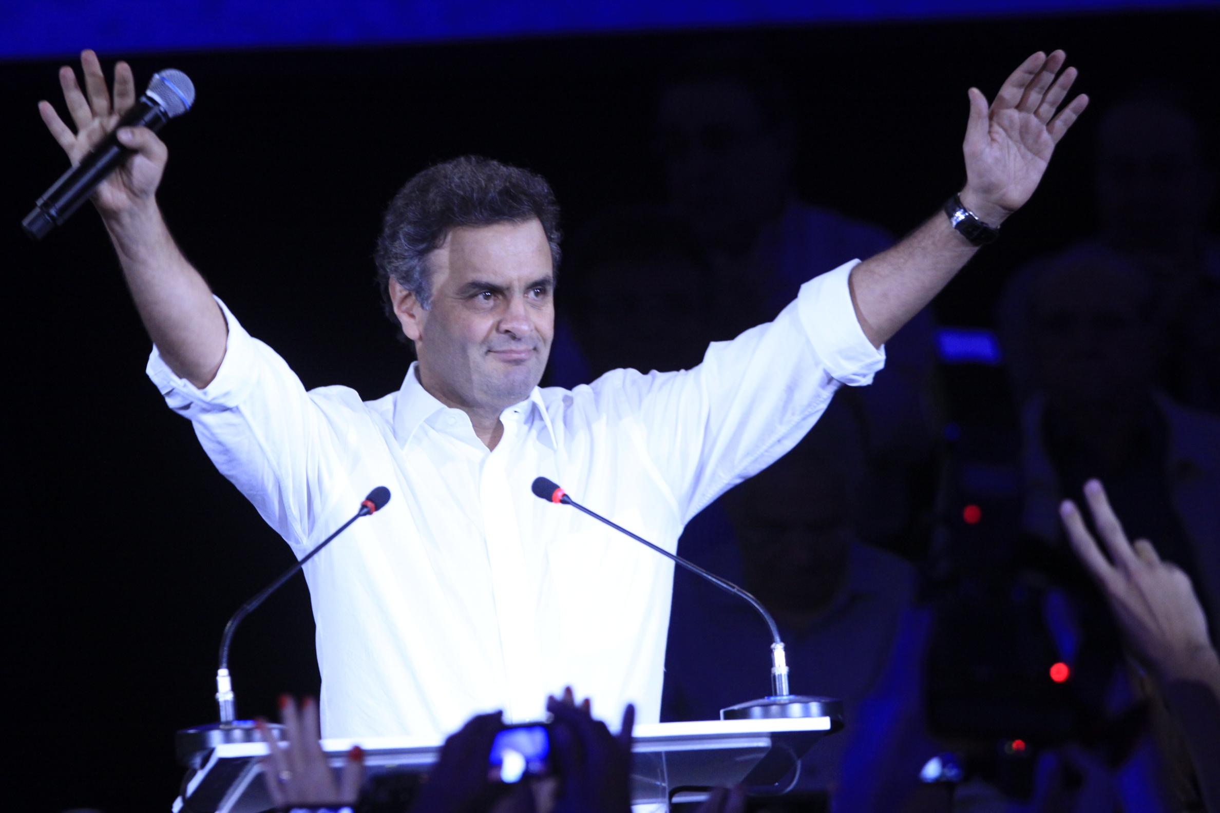 Aécio Neves na Convenção Nacional do PSDB em 2013.